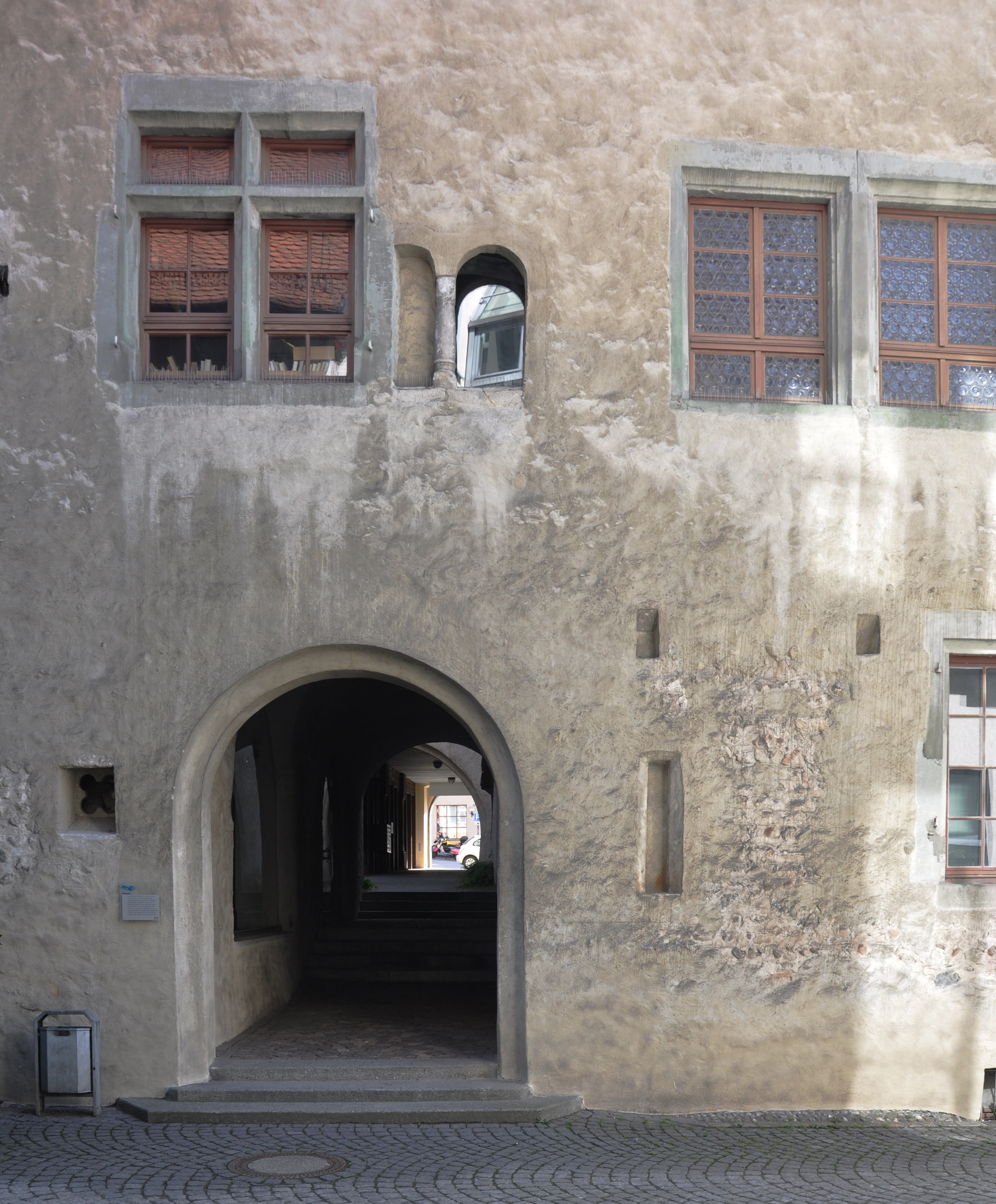 Ravensburg, „Romanisches Haus“, Fassade des Hintergebäudes Mohrengasse 8 (zum Gänsbühl) mit romanischer Säule